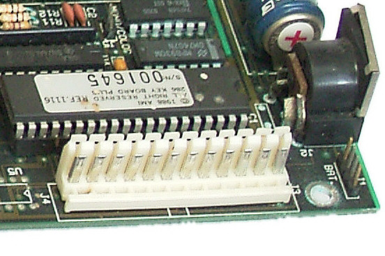 Anschlussleiste für die Stromversorgung auf einer Hauptplatne im (B)AT-Format